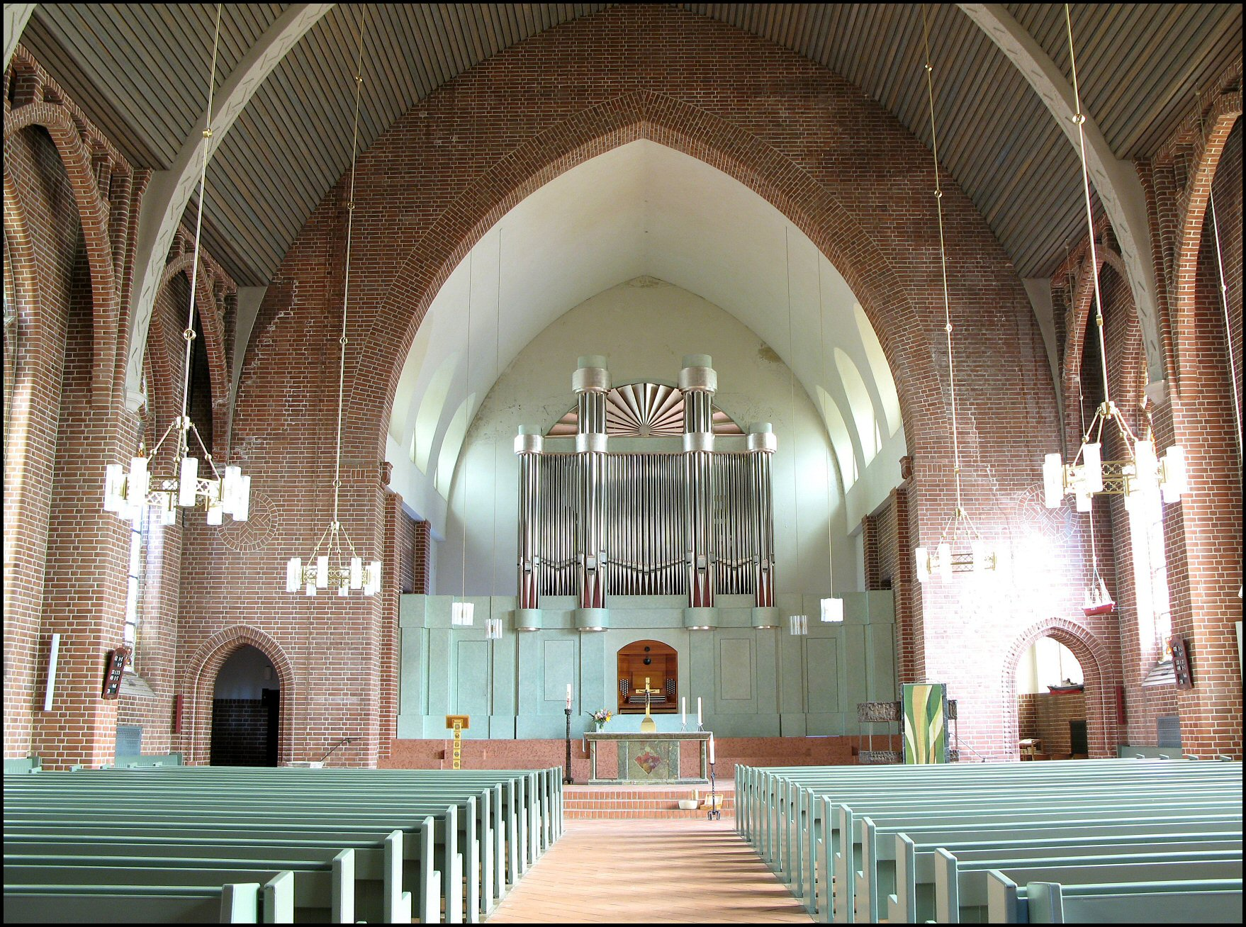 Orgel in Cuxhaven